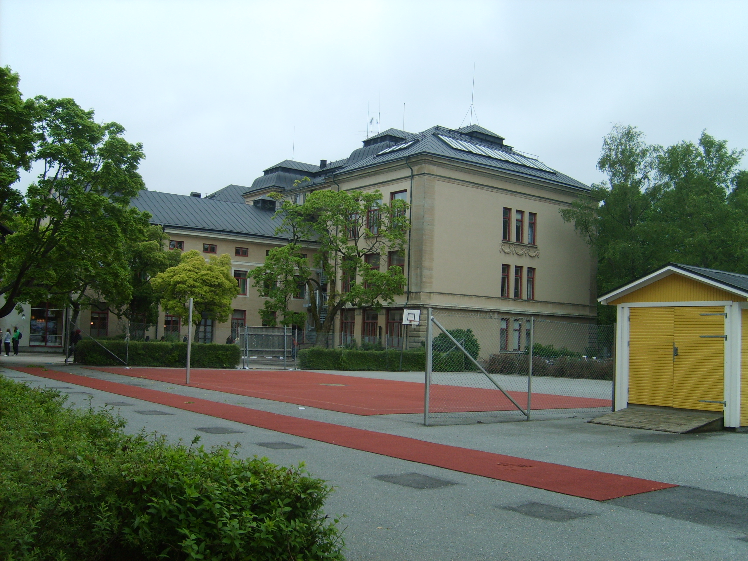 Bild av Karolinska skolans huvudbyggnad tagen från västra delen av skolgården.